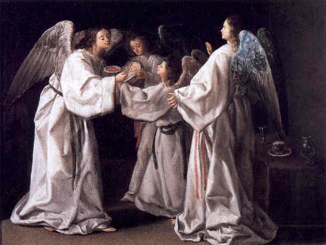 San Ramón Nonato alimentado por los ángeles